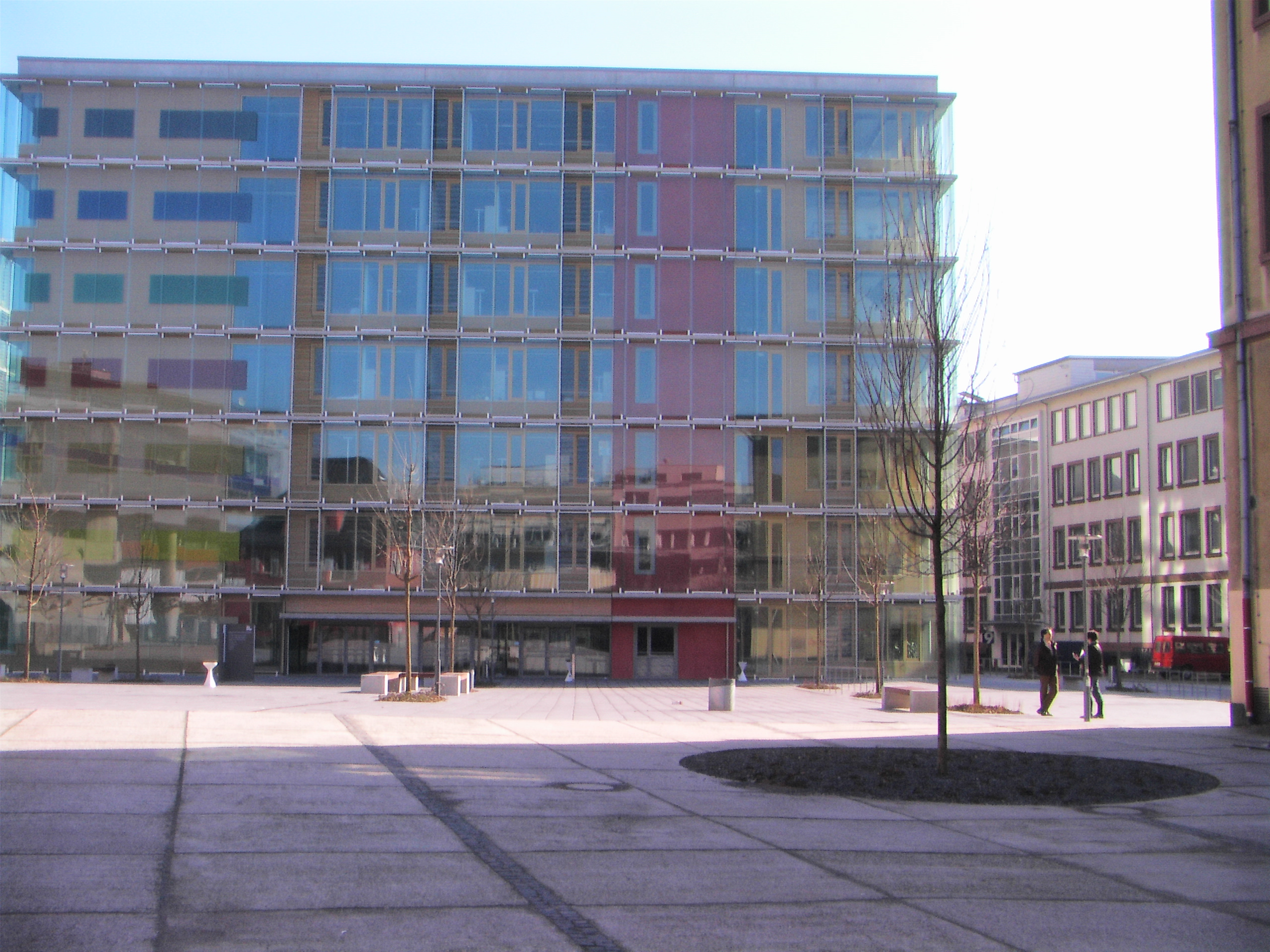 Fachhochschule Frankfurt am Main, Gebäude 1 von Westen aus mit Campus im Vordergrund